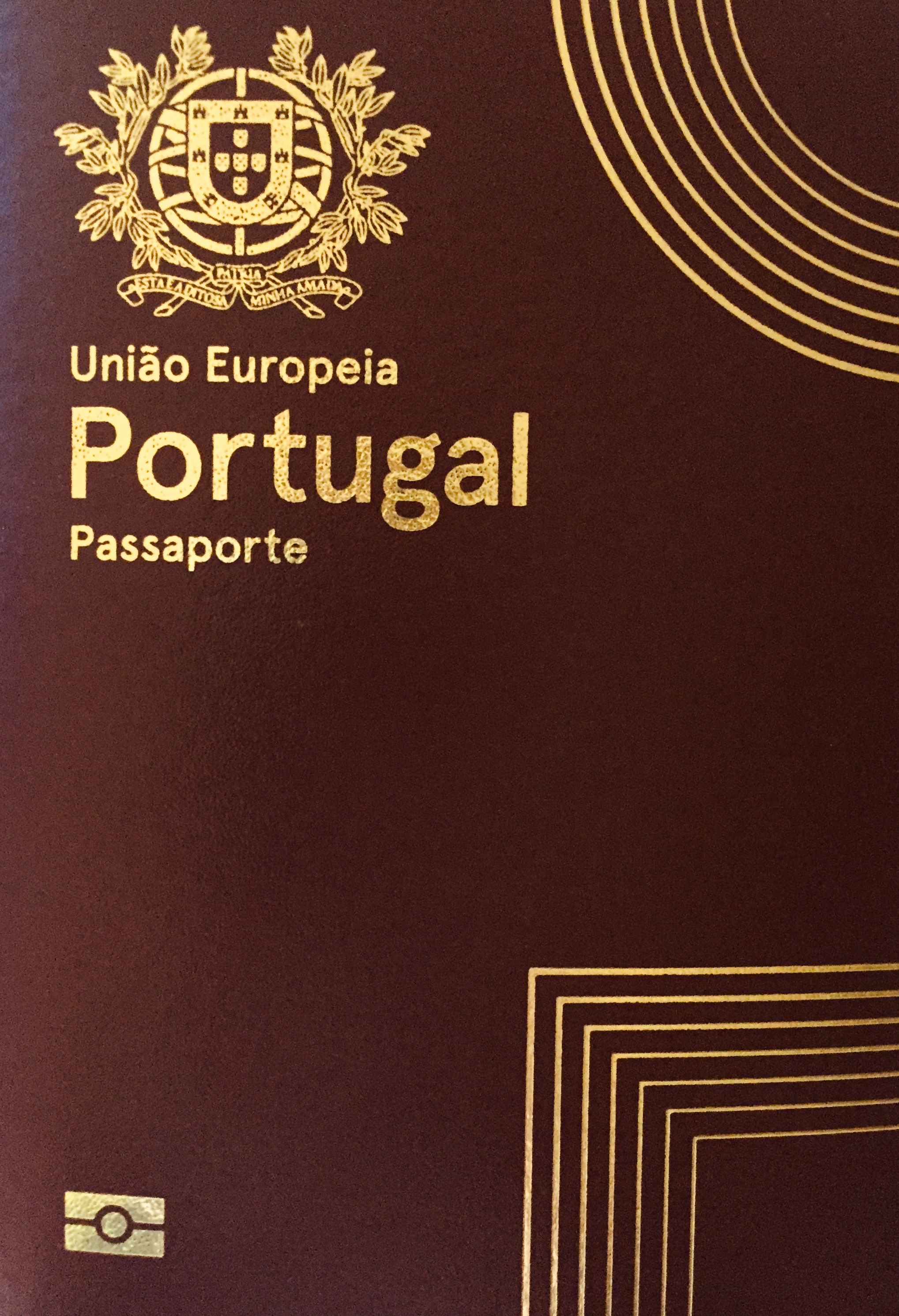 Capa do passaporte Português de 2017